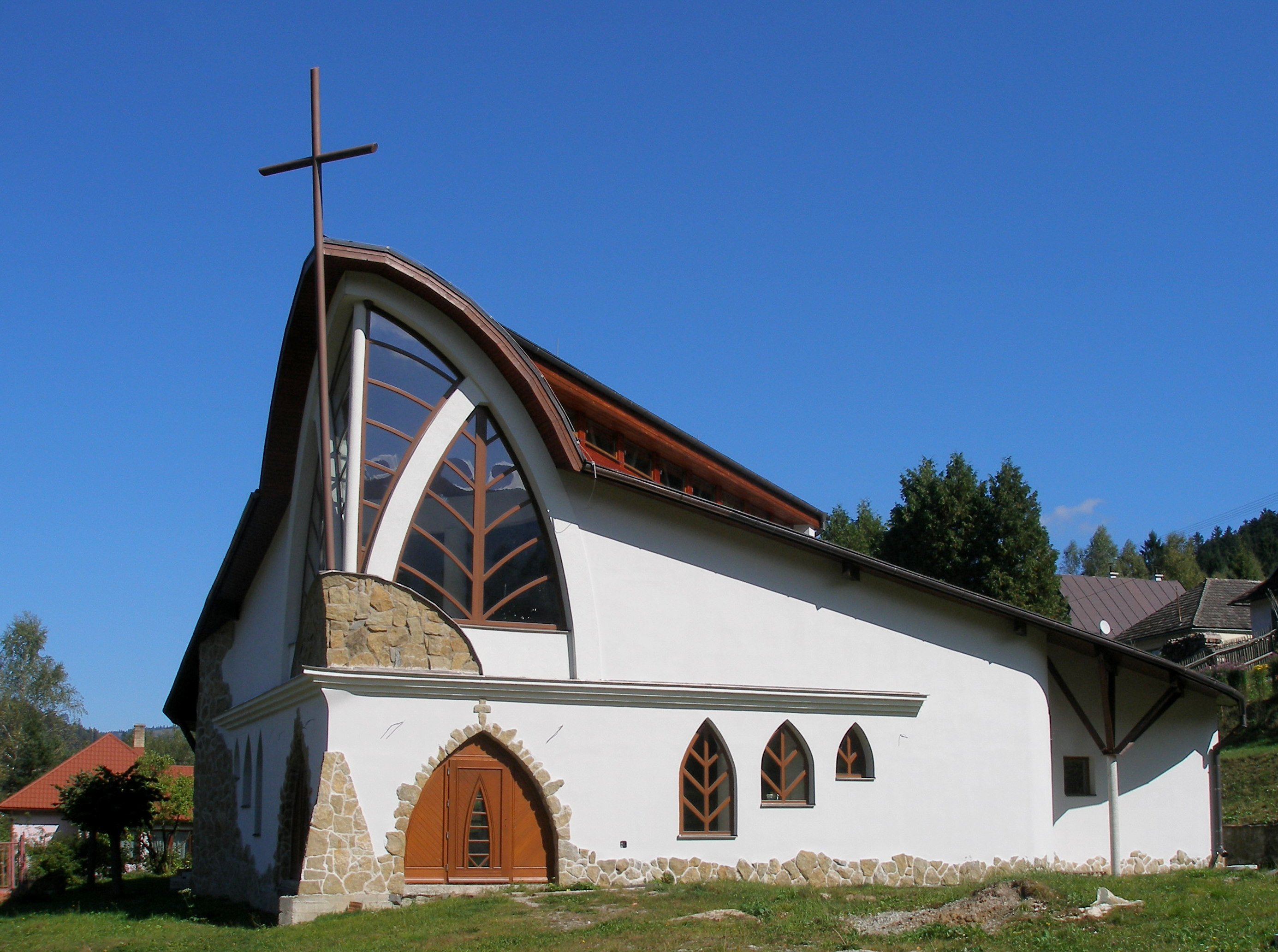 Spišská obec Stará Voda. Okres Gelnica